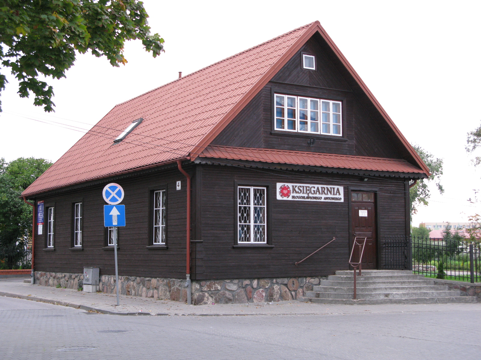 Dom drewniany z 1909r. przy ulicy Kościelnej 4 w Bielsku Podlaskim.